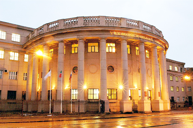 Корпус А